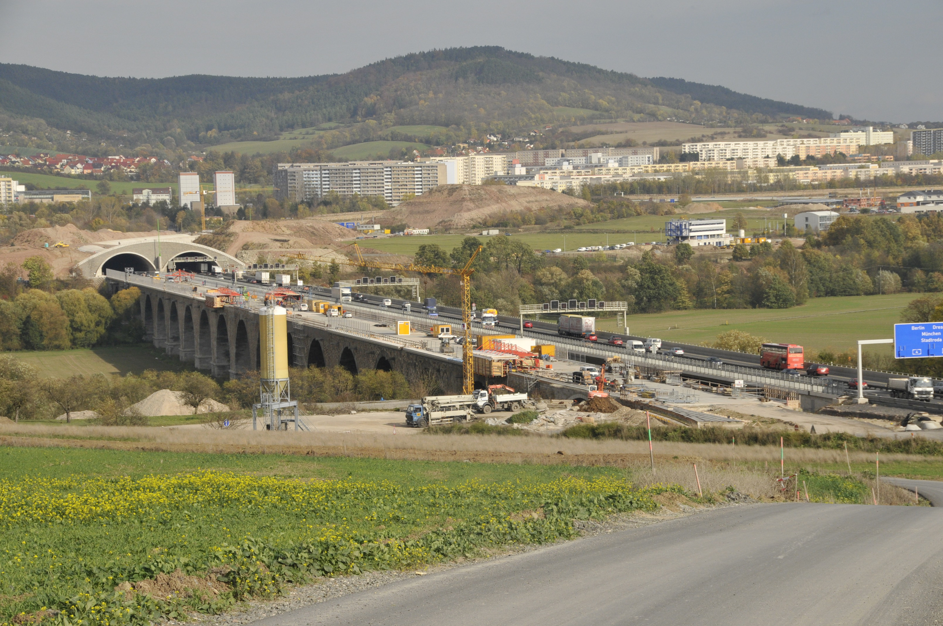 Saalebrücke der A 4 bei Jena Blickrichtung Nordost